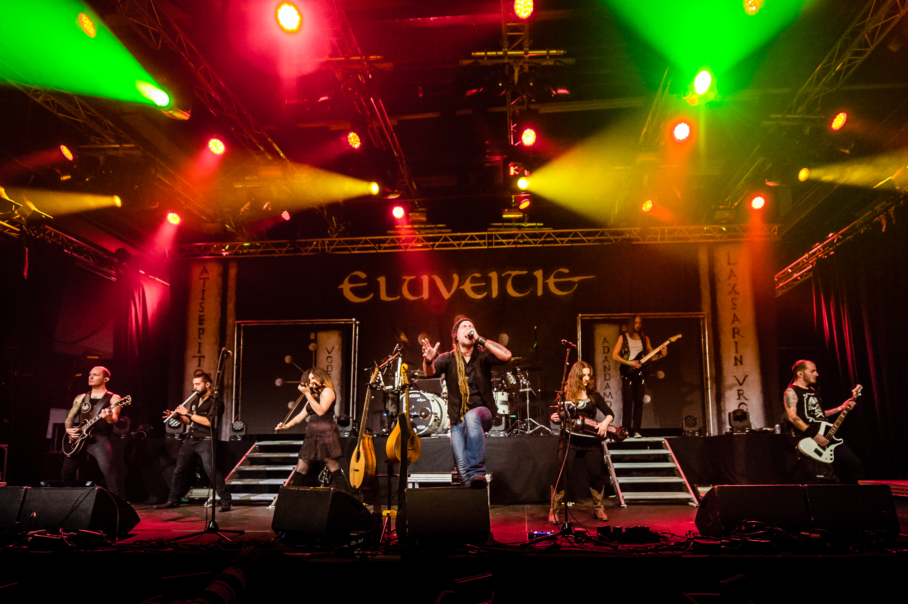 'Eluveitie - Epic Metal Fest - Eindhoven'